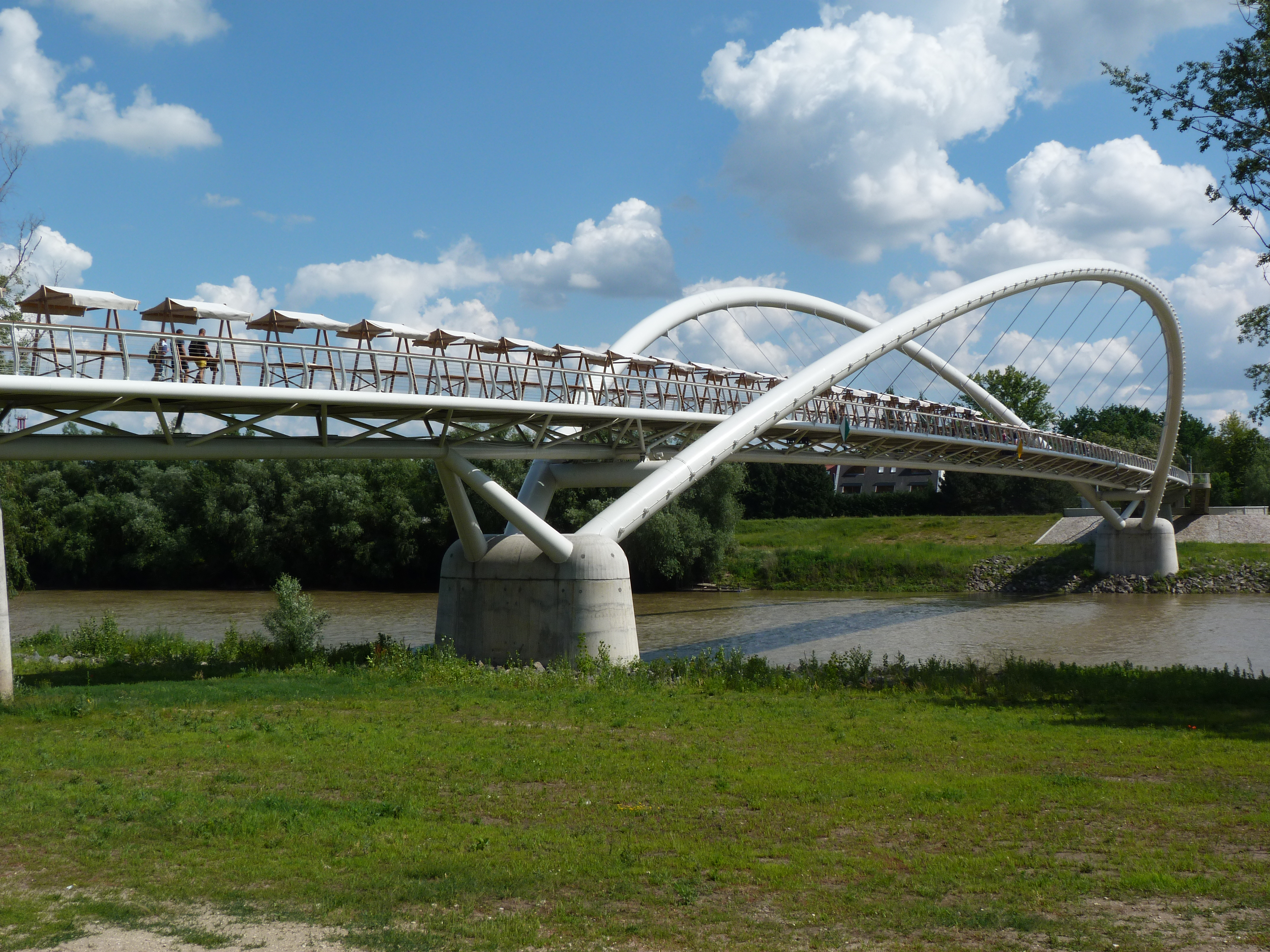 Live on the 14th of June, 2012. Szolnok, Hungary. Tisza river. Published under Creative Commons in the Metapolisz DVD line. A felvétel 2012. június 14 –én csütörtökön készült Szolnokon. Megjelent Creative Comons alatt a Metapolisz DVD sorozatban.